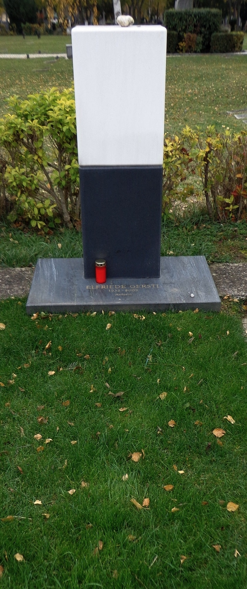 Wiener Zentralfriedhof - Gruppe 40: ehrenhalber gewidmetes Grab von Elfriede Gerstl